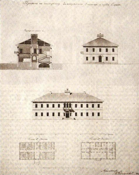 Беларуская (тарашкевіца): Слуцак (Słucak). Гімназія